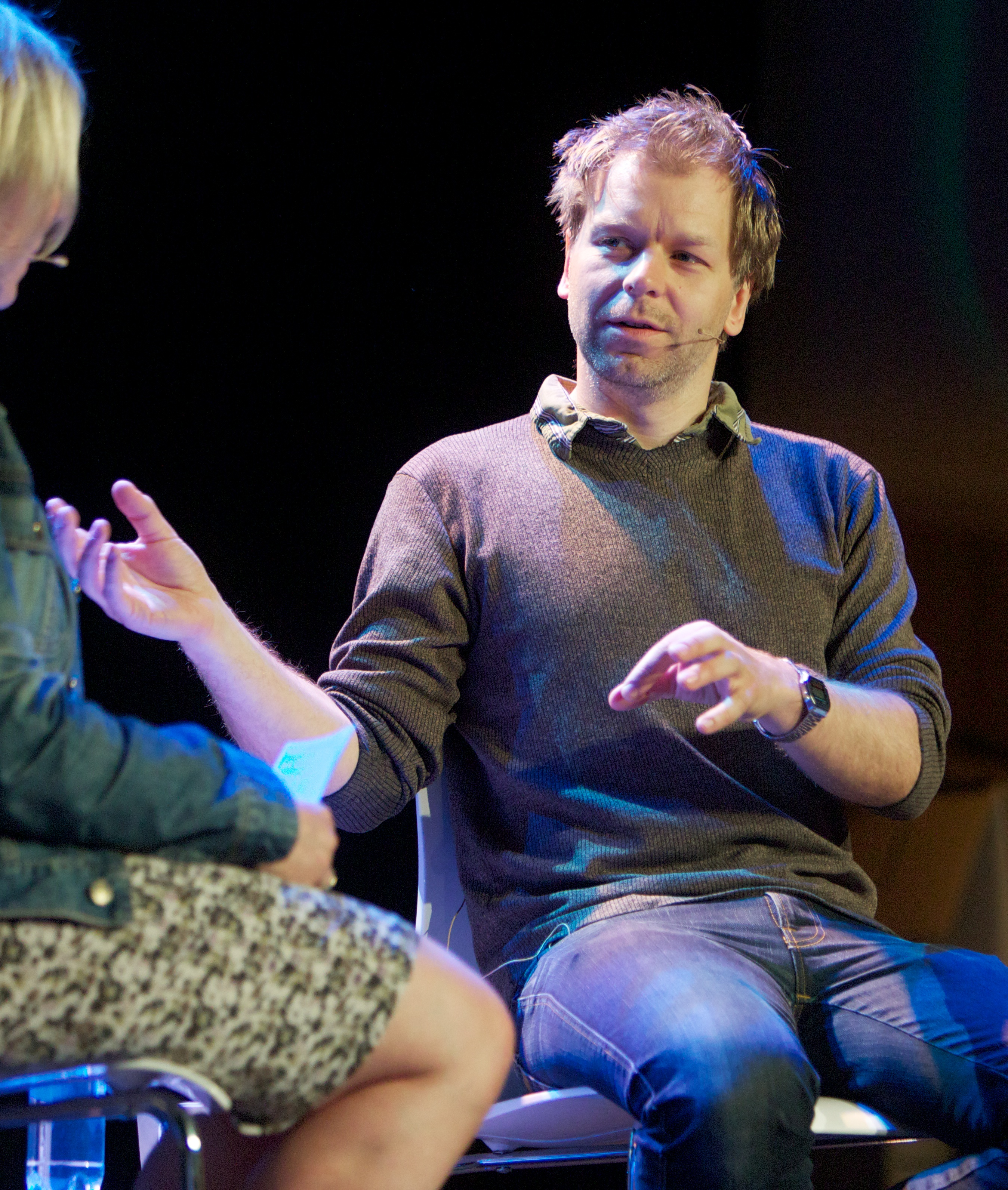 Bergen, 20110513. Nordiske Mediedager, fredag. Eckbo & Ødegård nisser igjen. Foto: Eirik Helland Urke